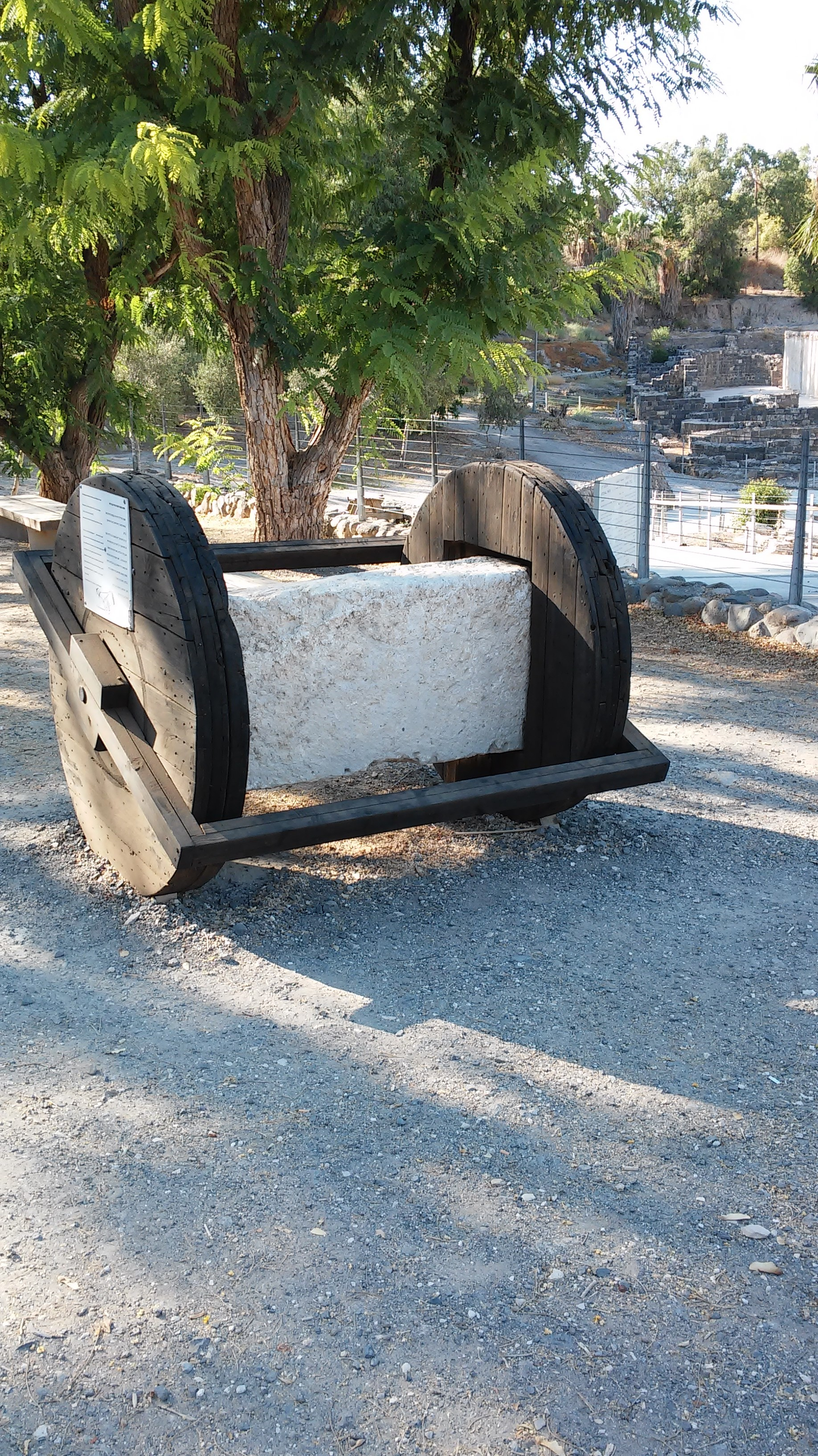 Vue de trois quarts d'une reconstitution de la technique de Métagénès pour le transports des pierres lourdes. Antique Beït Shéan, Scythopolis.